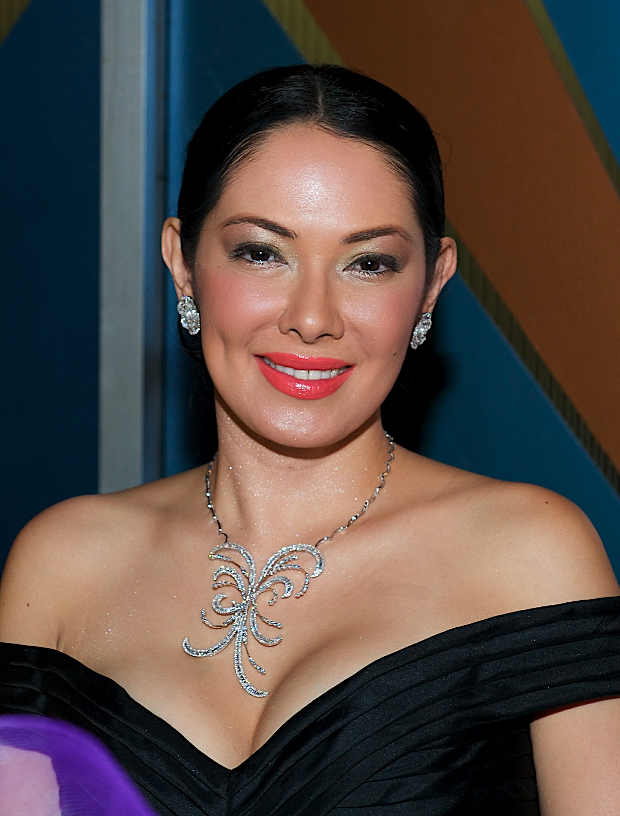 Ruffa Gutierrez, Filipino actress